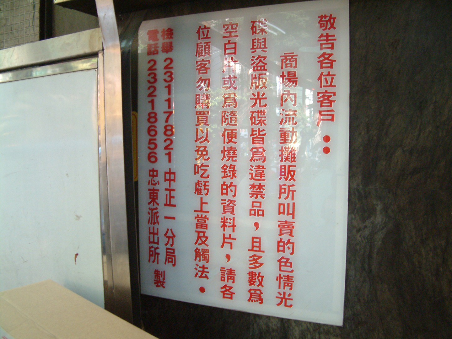 中文（台灣）: 臺北市政府警察局中正第一分局忠孝東路派出所於光華橋下光華商場入口設立的告示牌，呼籲顧客勿買商場內流動攤販叫賣的色情光碟與盜版光碟。